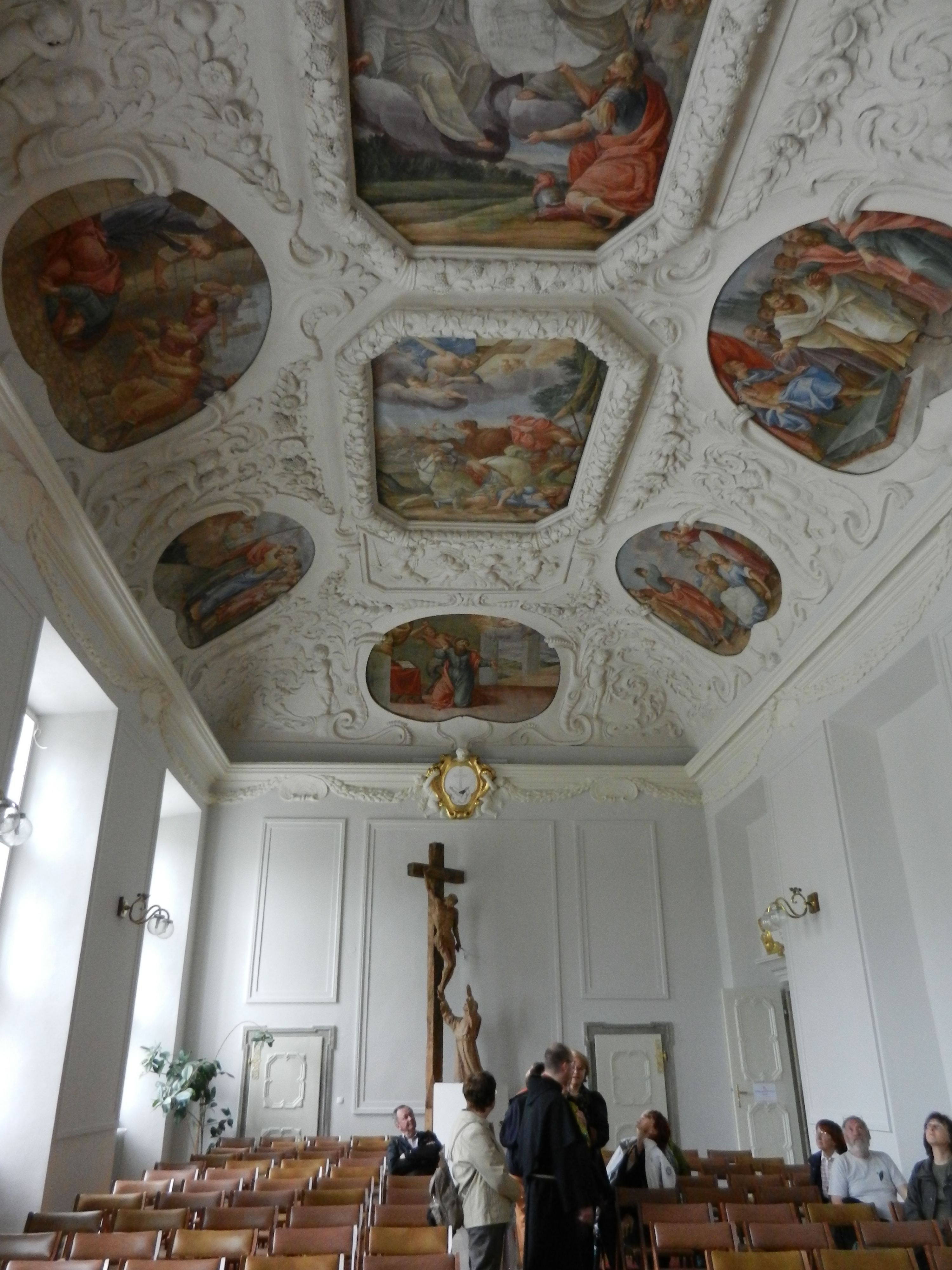 Refektorij v Minoritskem samostanu na Ptuju